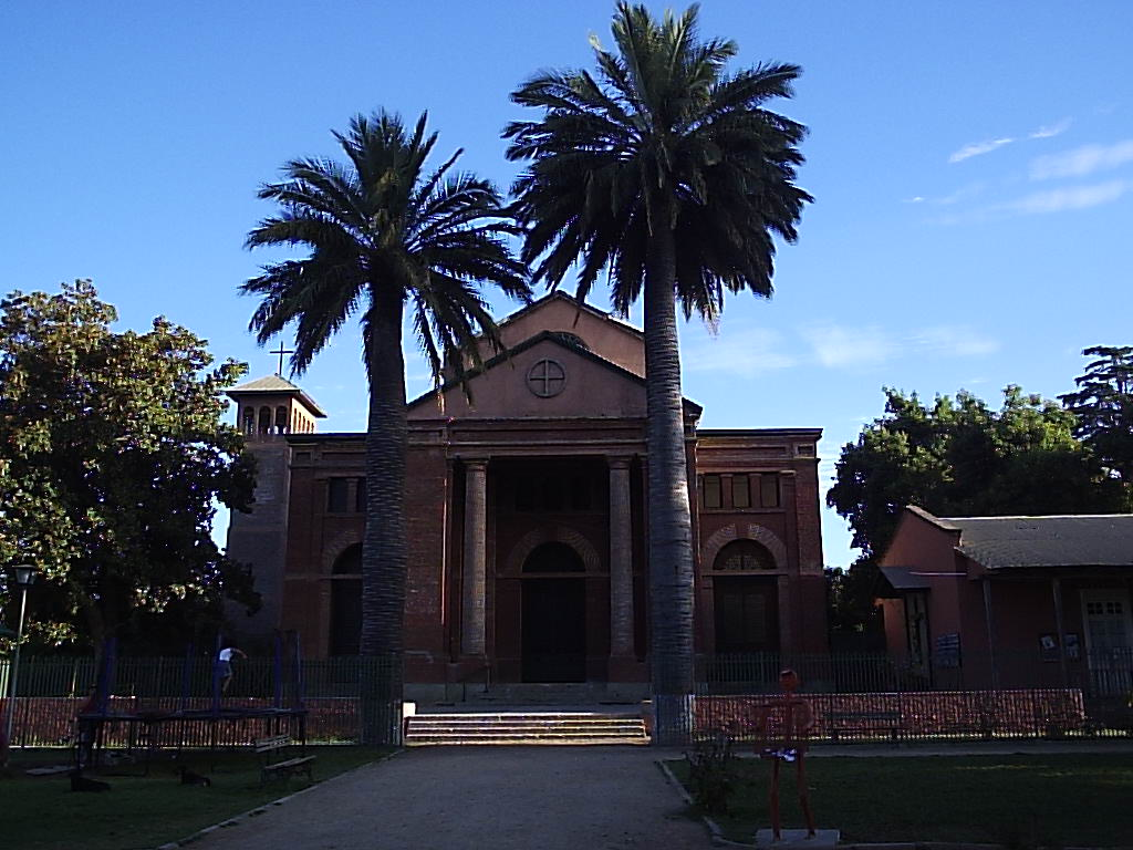 Iglesia de Nancagua Autor:Alstradiaan Fecha:Febrero de 2005 Fotografía tomada con una cámara digital Olympus camedia D-395 de 3.2 megapixeles Categoría:Chile (imagen)